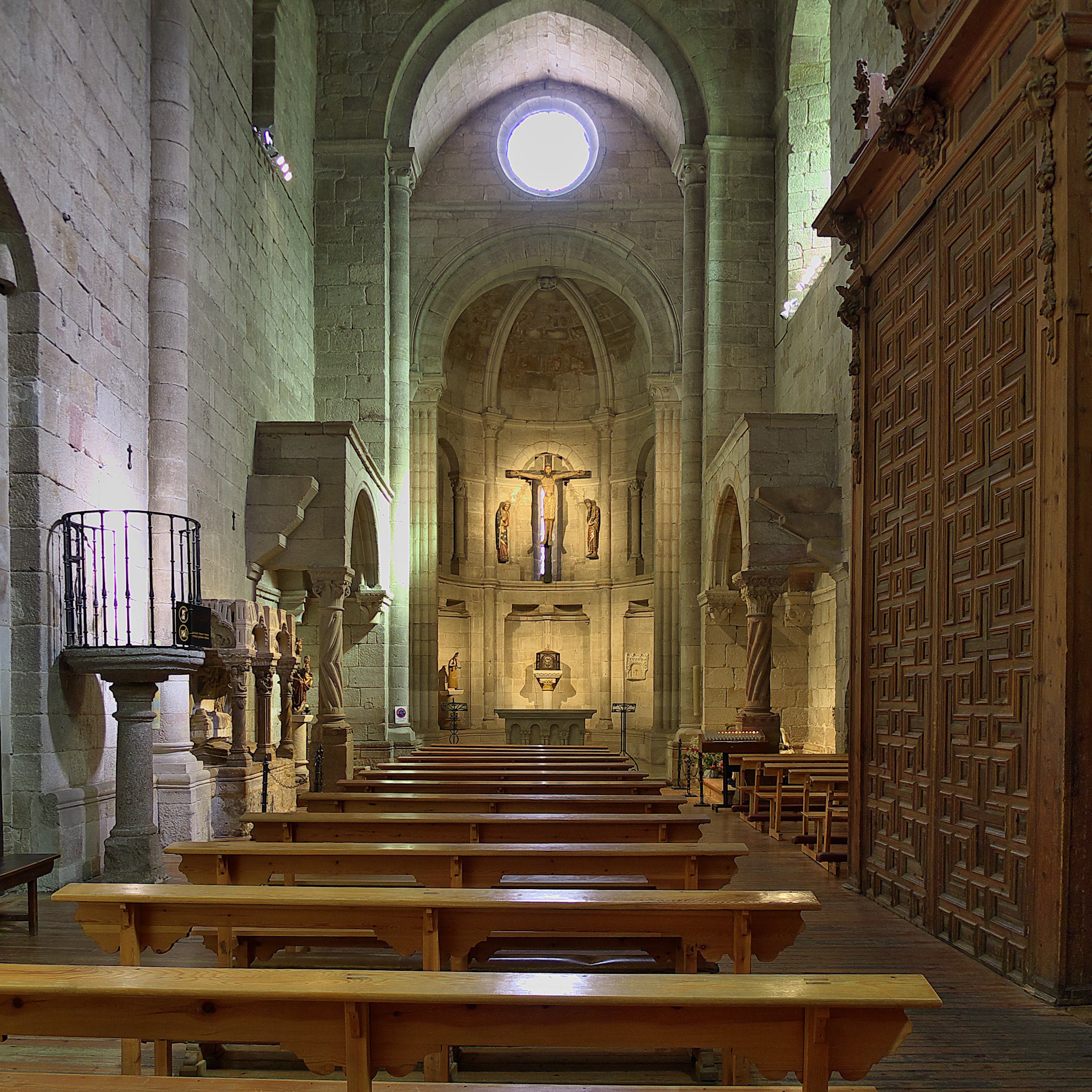 Entre los principales monumentos románicos españoles de principios del XII, atribuido a Giral Fruchel. Perteneció a la Orden de San Juan de Jerusalén, conocida su existencia durante el reinado de Alfonso IX de León (1230). Características arquitectónicas singulares, su extraña altura; los baldaquinos en el crucero, y el sepulcro de una mujer o reina dentro de un baldaquino.